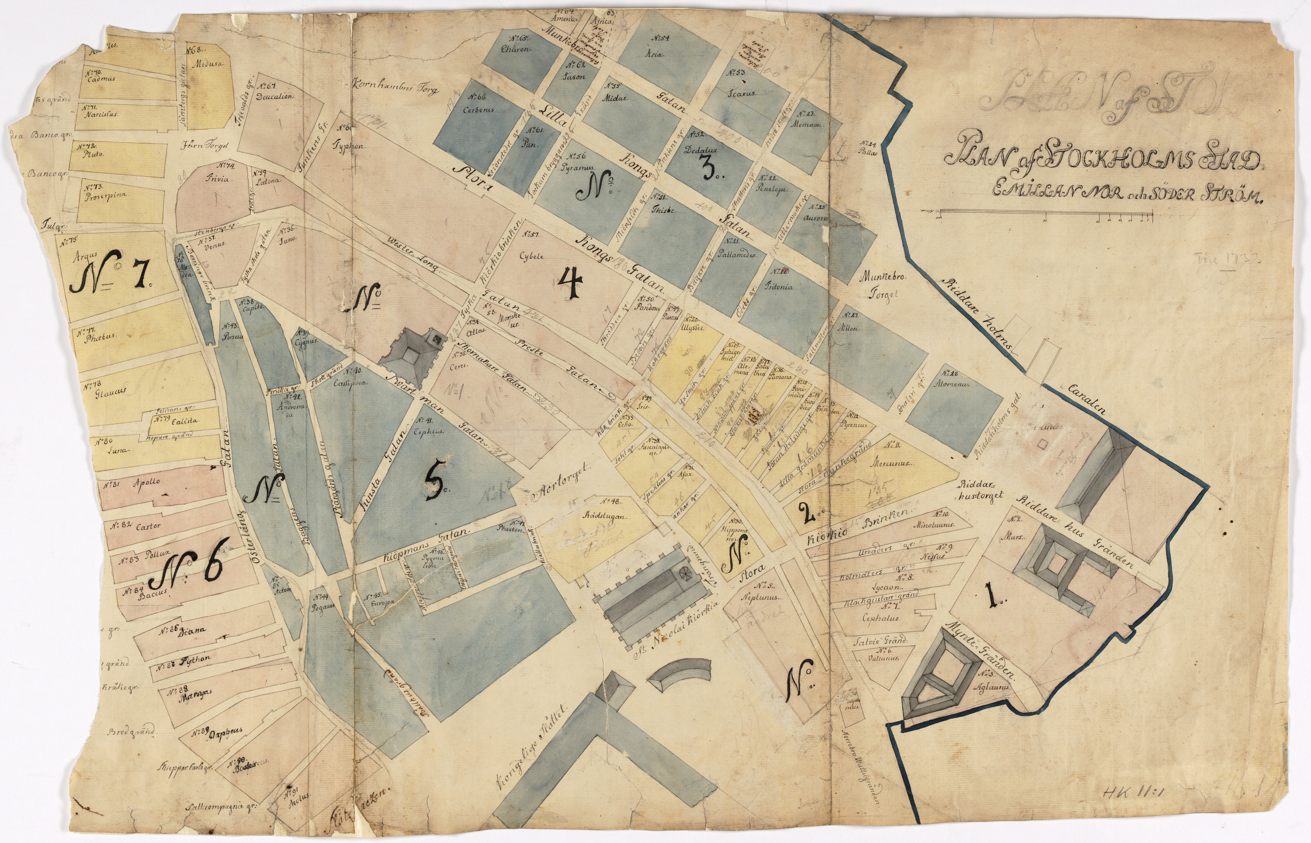 Plan av Stockholms stad mellan norr- och söderström 1733 (norr är nertill)